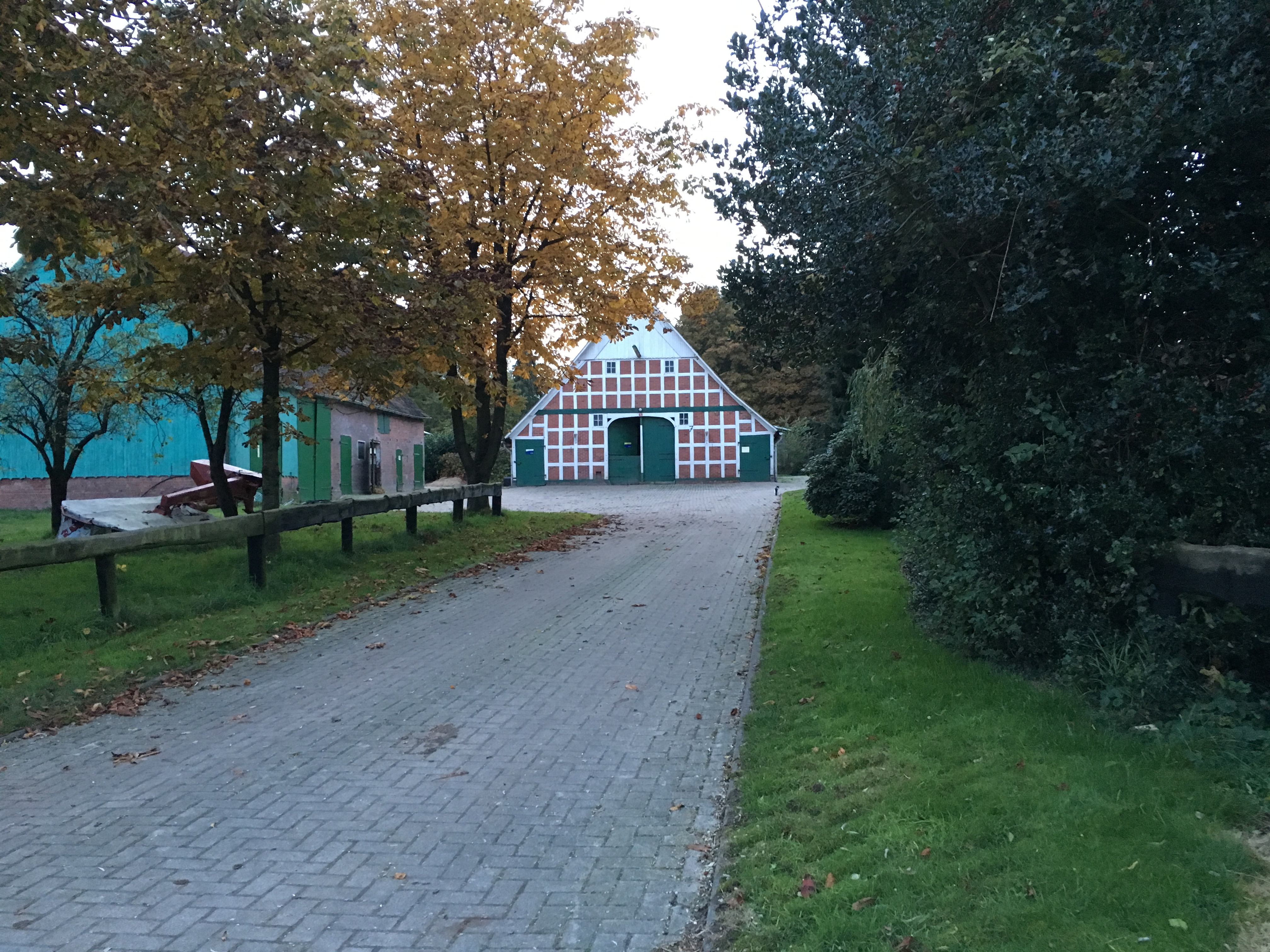 Buurnhuus in Rahden